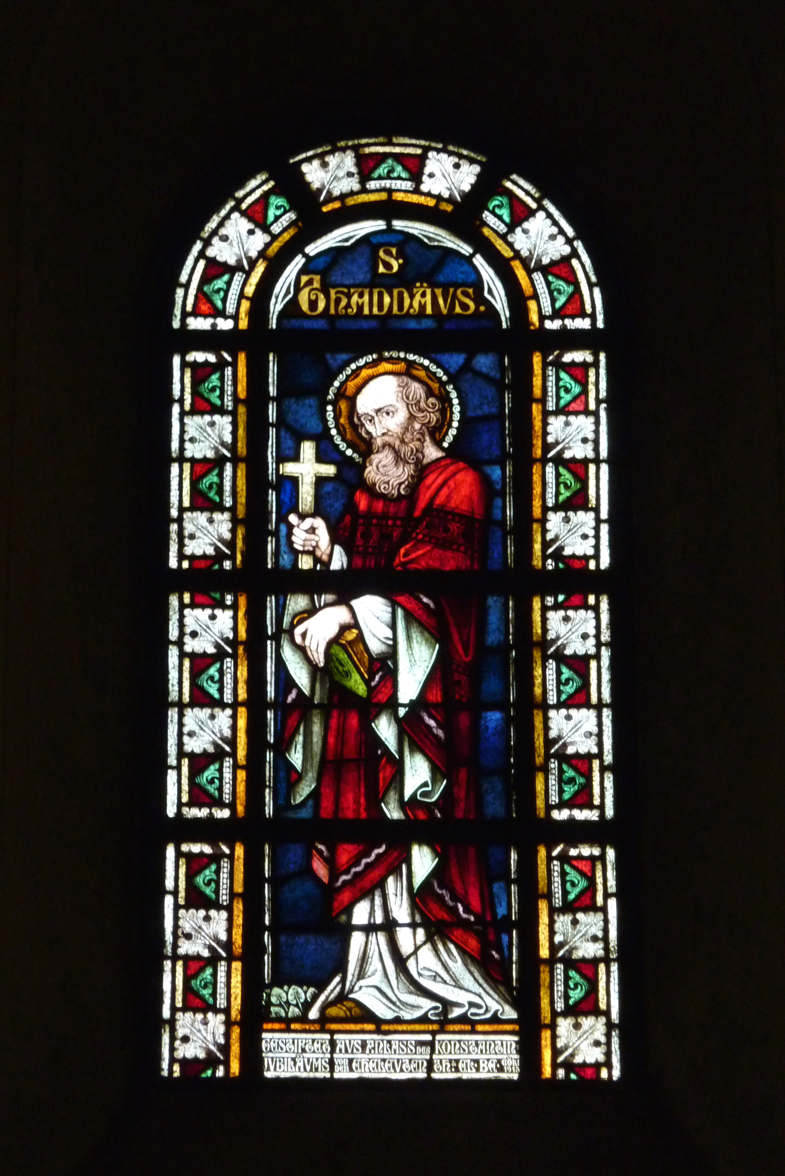 Katholische Kirche St. Maria Magdalena und St. Andreas des ehemaligen Prämonstratenser-Klosters Knechtsteden in Dormagen im Rhein-Kreis Neuss (Nordrhein-Westfalen), Bleiglasfenster im Langhaus von 1913, Darstellung: Apostel Thaddäus